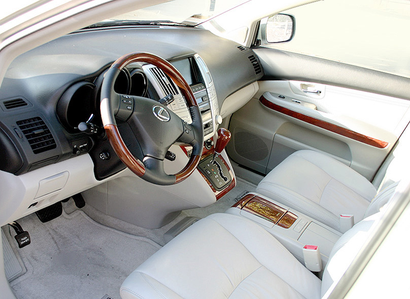 2007 Lexus RX350